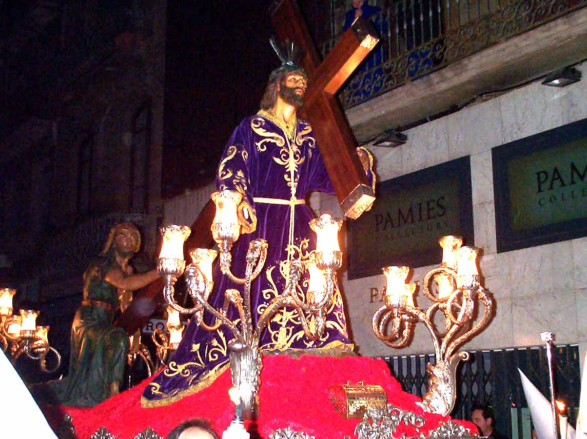 Nuestro Padre Jesús del Calvario, el Nazareno de Reus